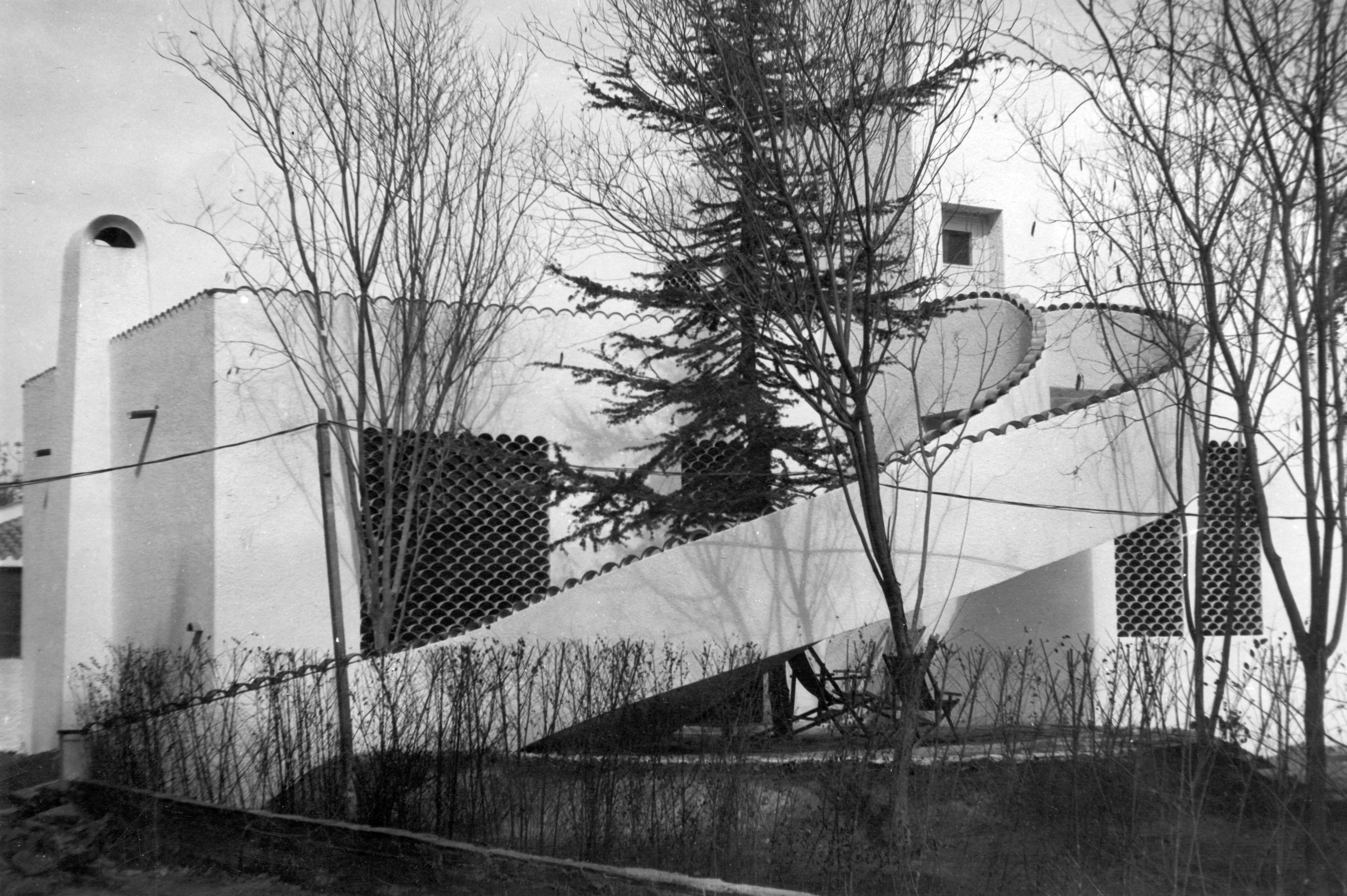 Michelangelo Perghem Gelmi progetta la sua abitazione a San Juan (Argentina)